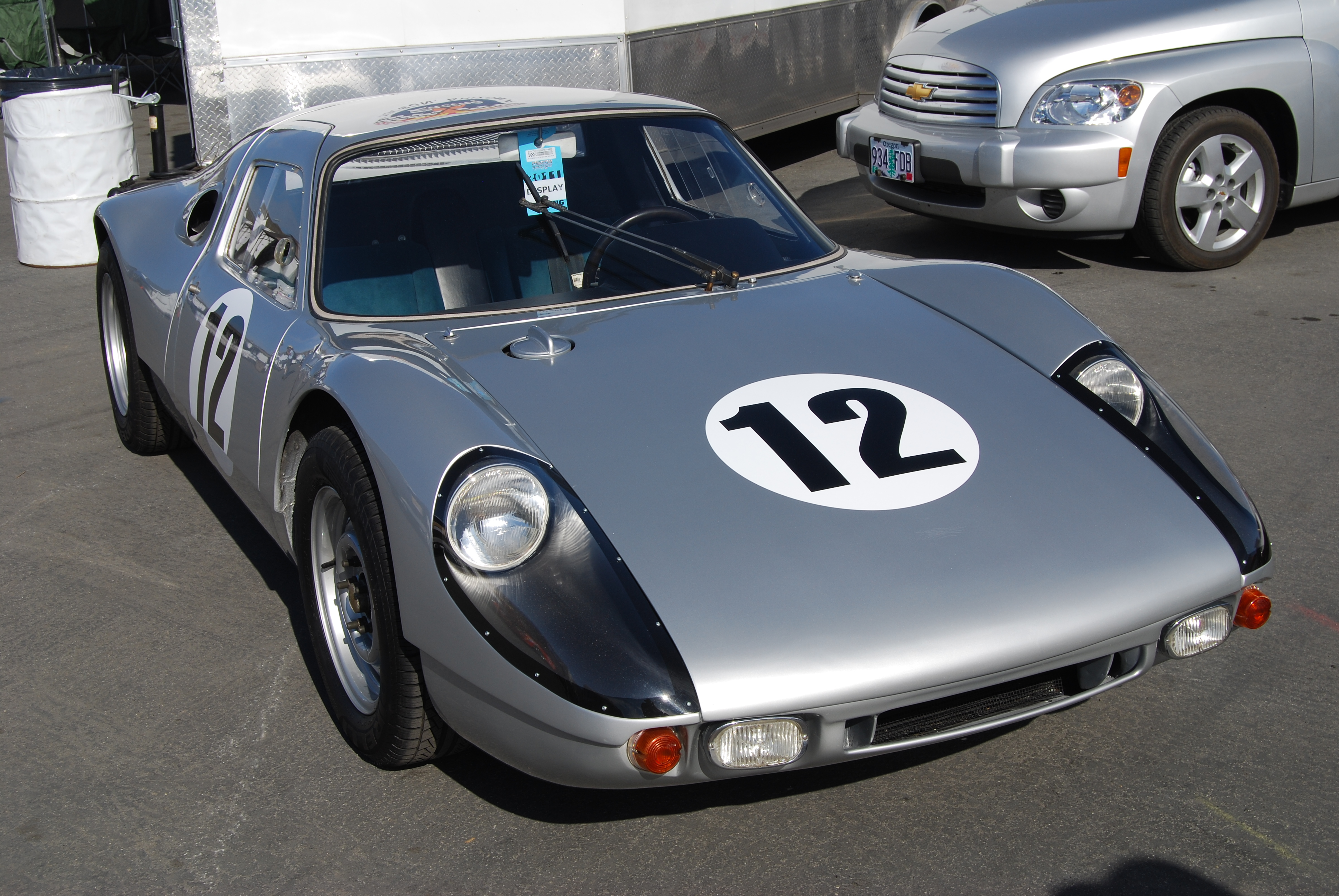 Silver Porsche 904 #12 DSC_0118